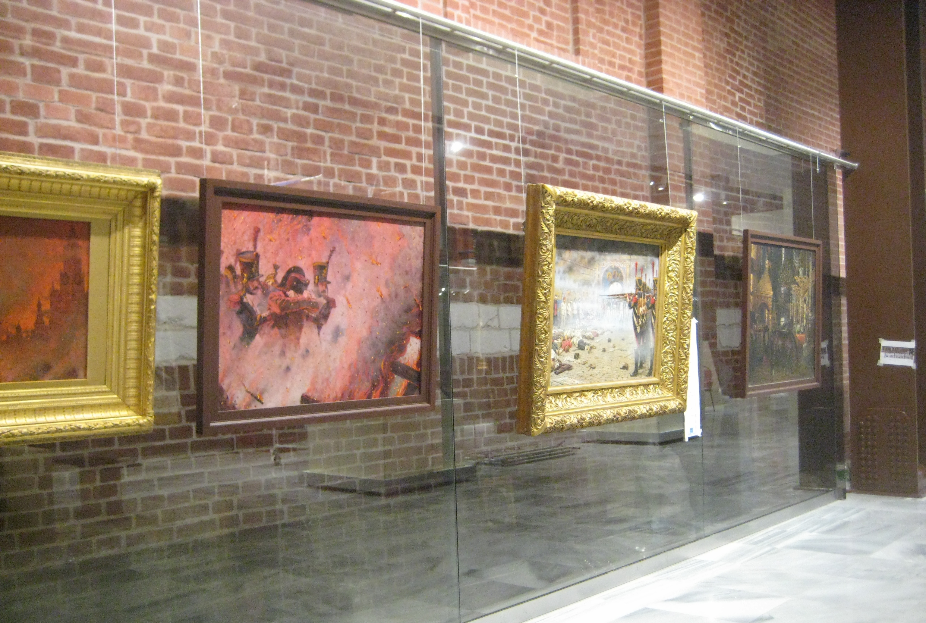 Серия "1812" Верещагина. Музей 1812 года